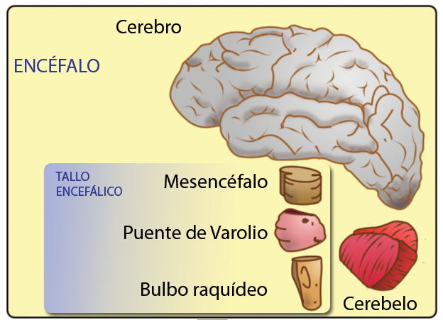 Esquema de las secciones del encéfalo humano. Basado a partir de: Snell RS (2003) Neuroanatomía clínica: Panamericana. 554 p.